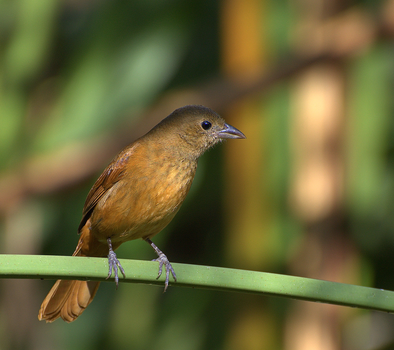 Folha Seca - Ubatuba-SP - Brasil